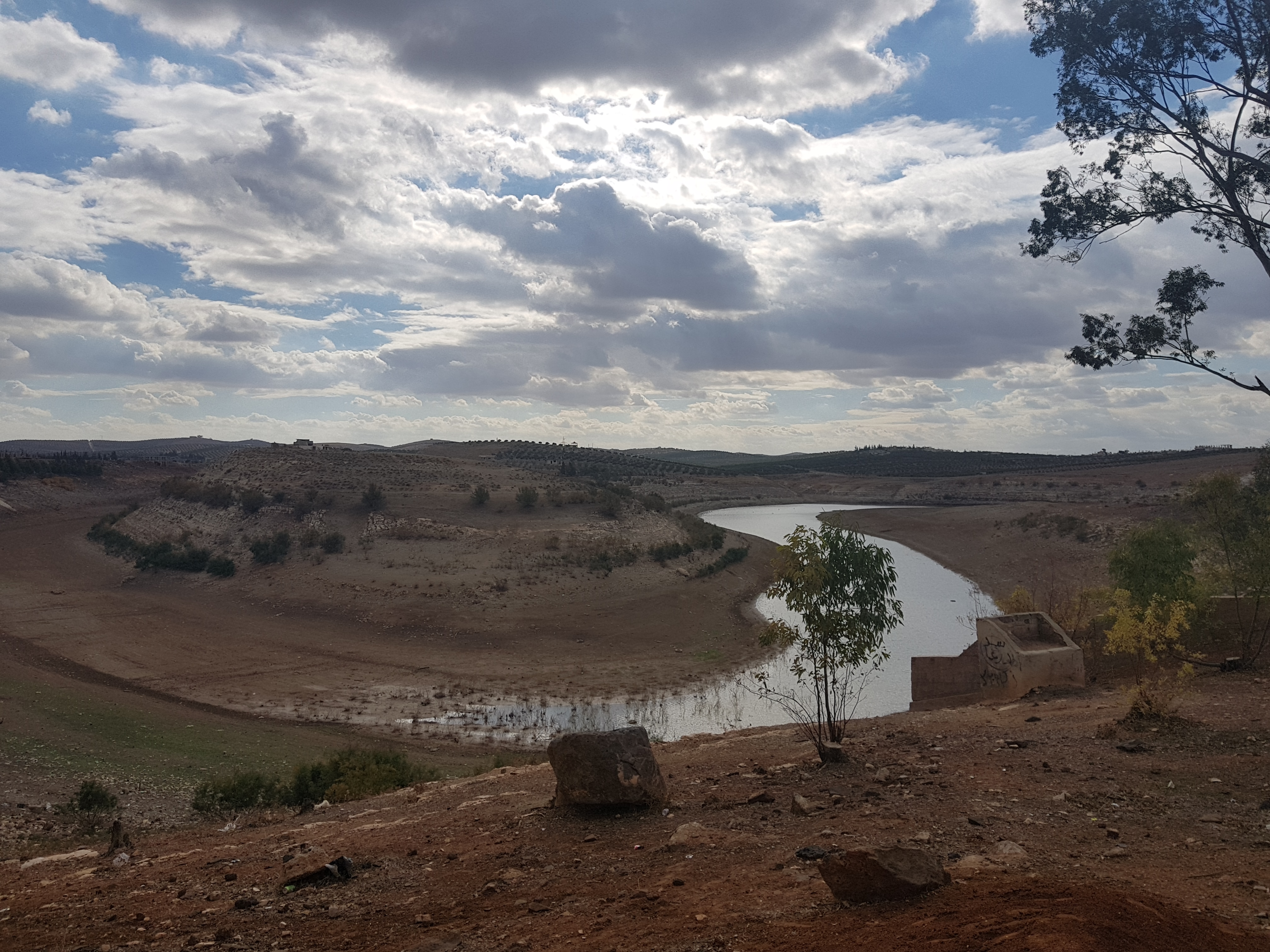 تعرض هذه الصورة الجفاف الحاصل لسد درعا الشرقي بعدما كانت المياه تغمر المنطقة حتى مكان وقوف المصور، التقطت هذه الصورة بتاريخ 1-12-2018